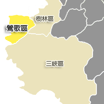 鶯歌區相對位置。